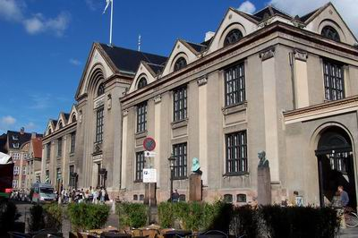 2004年8月沐童摄于丹麦哥本哈根。